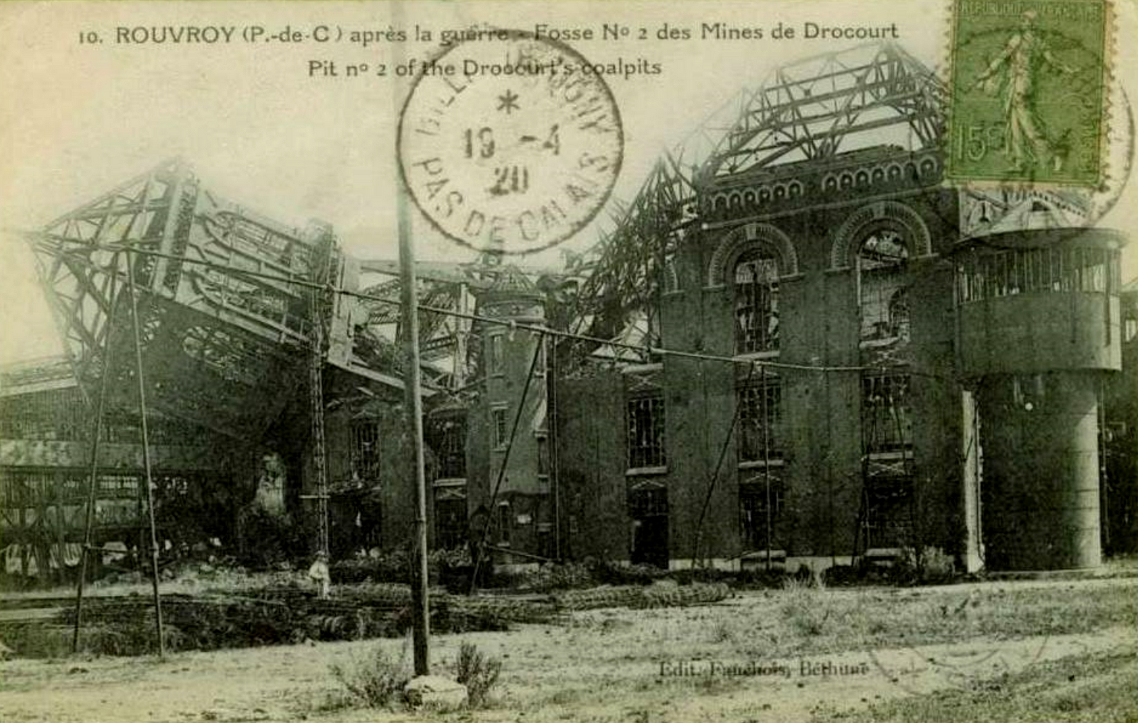 La Fosse n° 2 dite Nouméa de la Compagnie des mines de Drocourt était un charbonnage constitué d'un seul puits situé à Rouvroy, Pas-de-Calais, Nord-Pas-de-Calais, France.